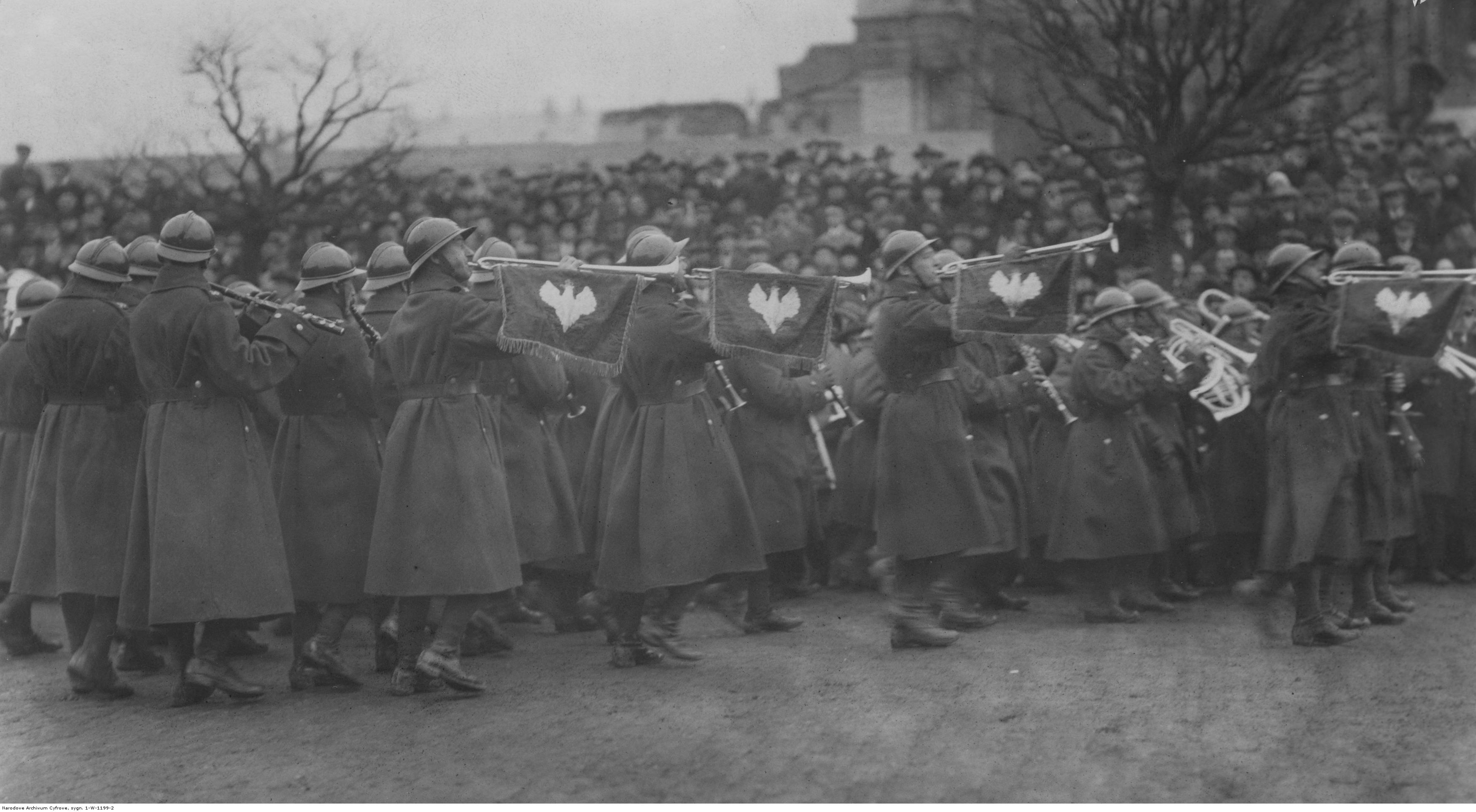 Święto 21 pułku piechoty w Warszawie. Orkiestra 21 pułku piechoty podczas defilady; listopad 1925. Koncern Ilustrowany Kurier Codzienny - Archiwum Ilustracji. Sygnatura: 1-W-1199-2